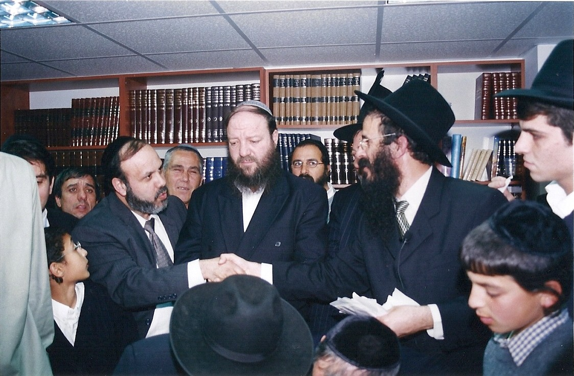 הרב נתן בוקובזה ז"ל עם השר דוד אזולאי ז"ל, בהכנסת ספר תורה בבית הכנסת שמתחת לבית הרב בוקובזה. ביניהם הרב משה קליין, רב המרכז הרפואי הדסה. תחילת שנות האלפיים